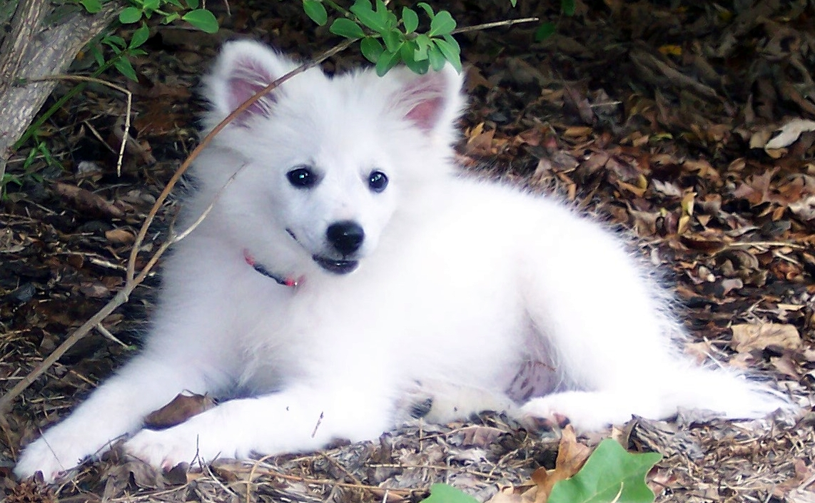 American Eskimo Puppy